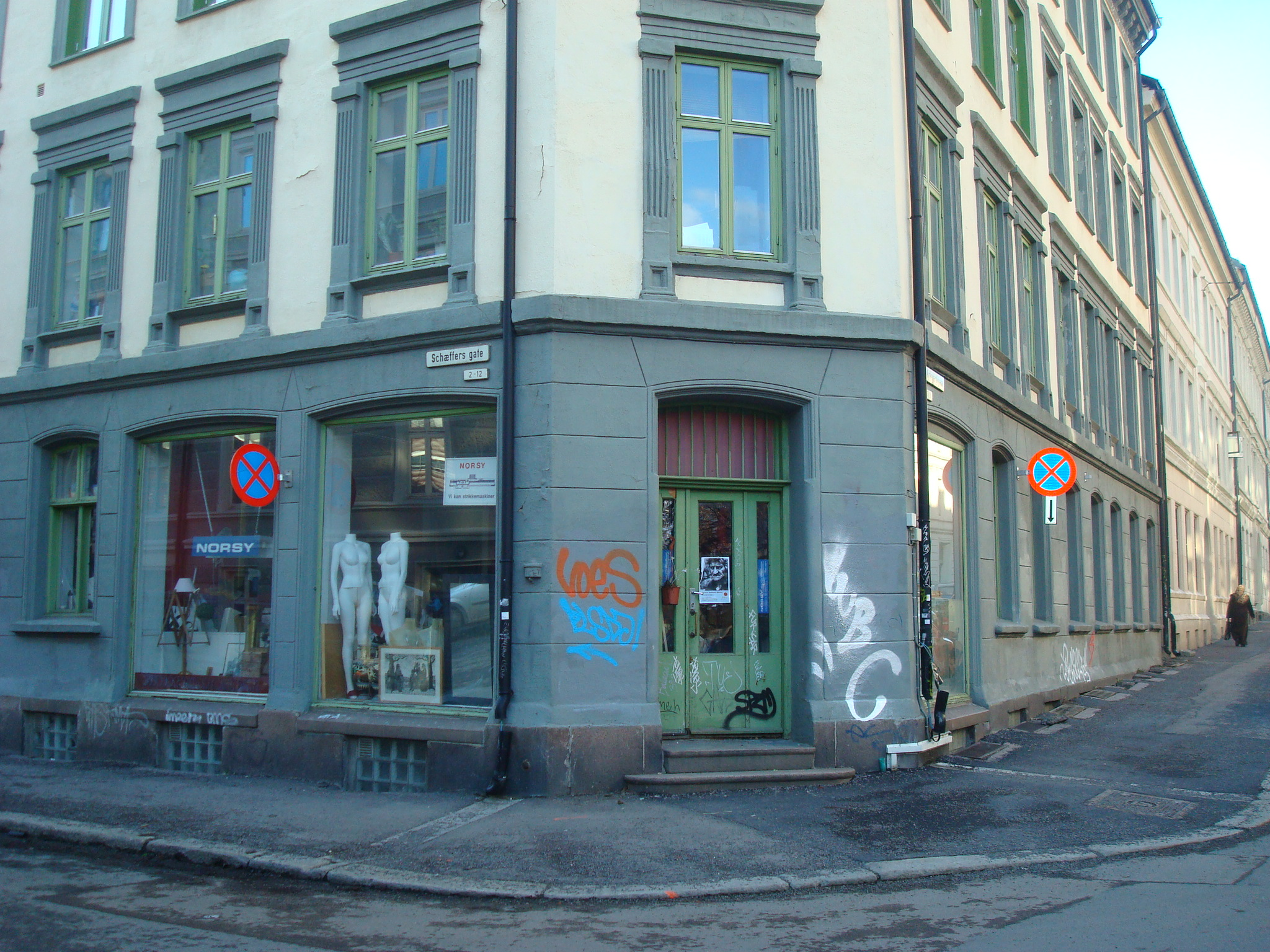 Schæffers gate nr. 12 i Oslo.